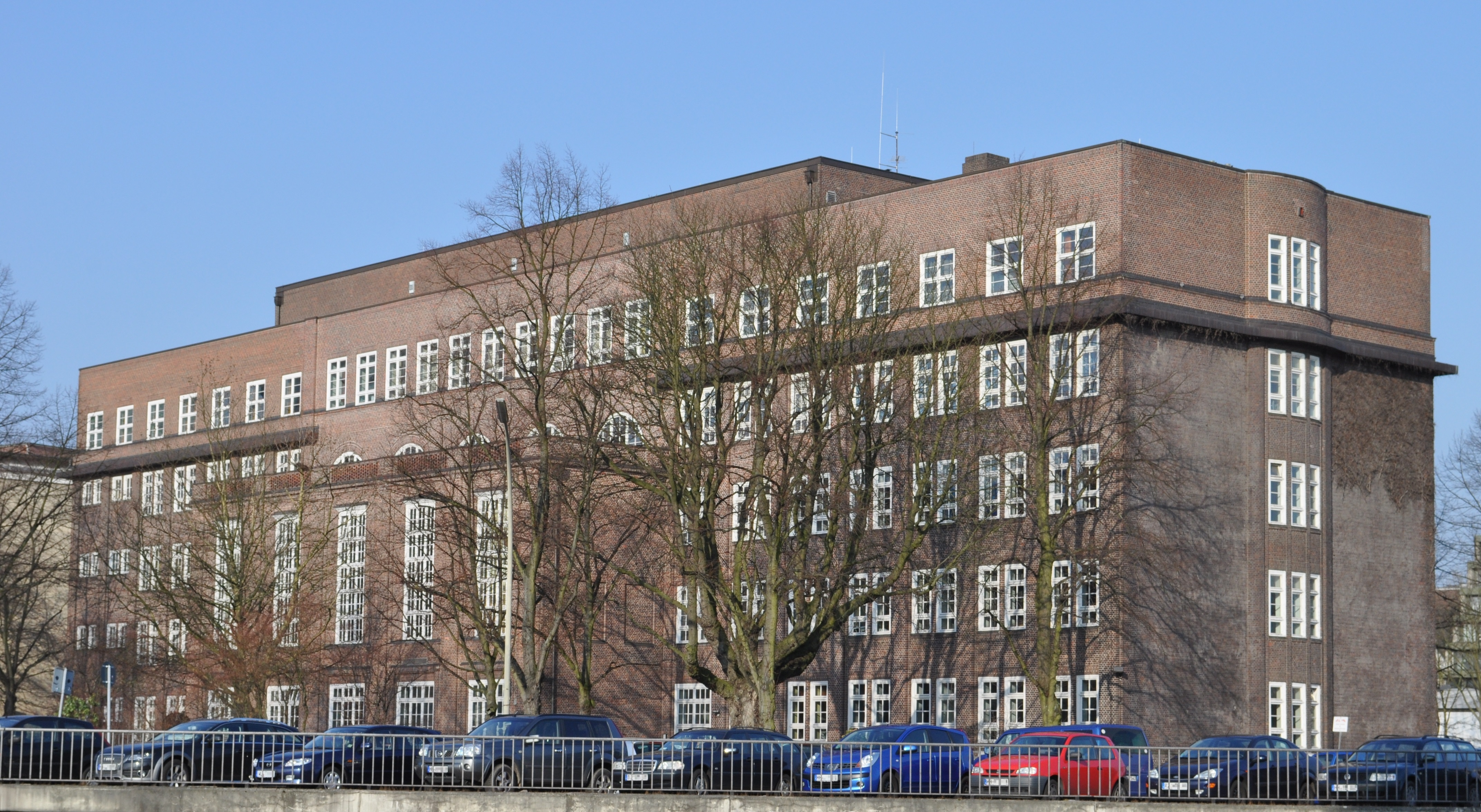 Klosterschule am Westphalensweg 7 in Hamburg-St. Georg. This is a photograph of an architectural monument.